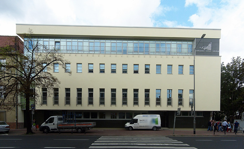 Nowe skrzydło WCO (2013), Poznań, ul. Garbary